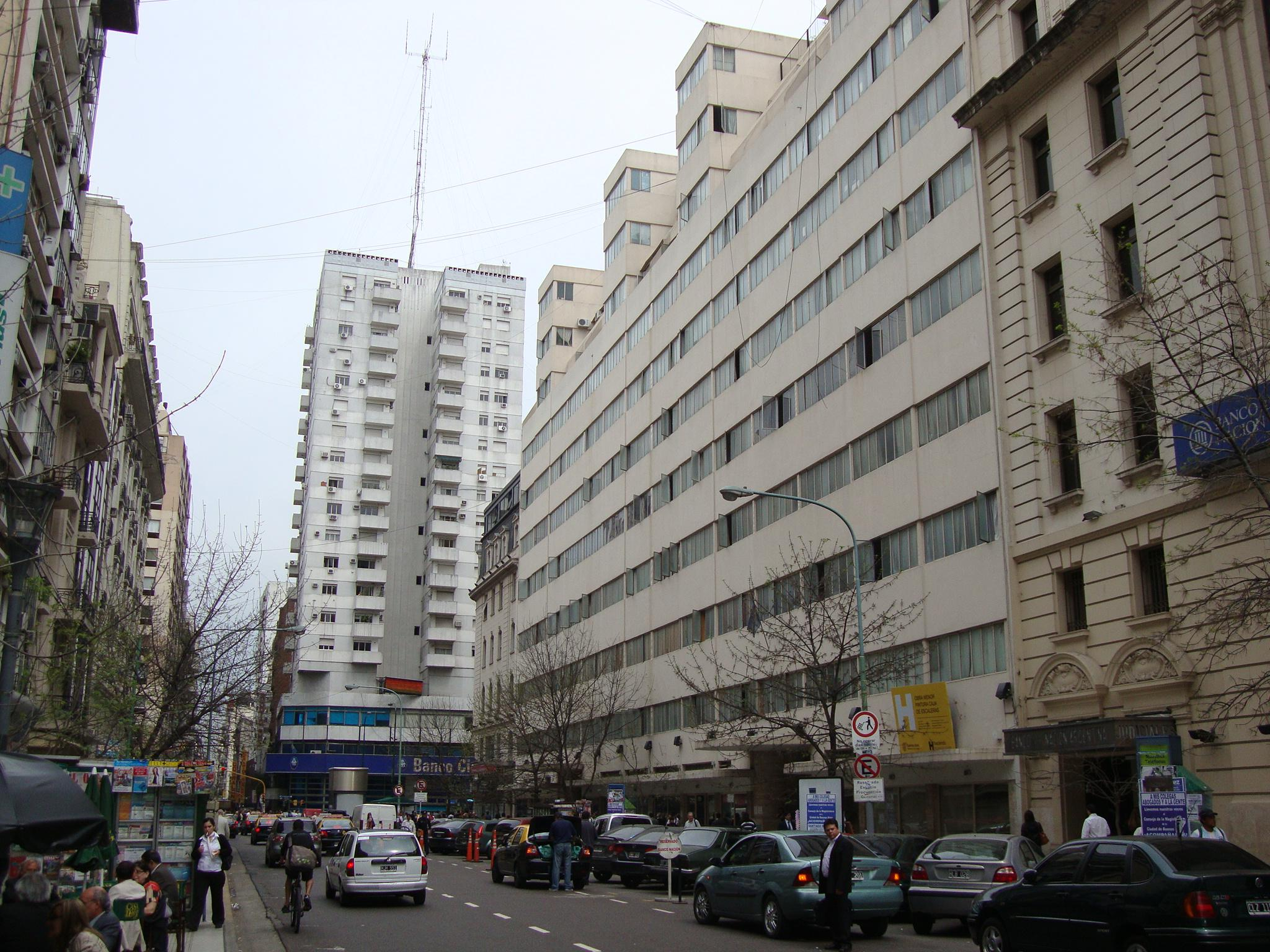 Calle Uruguay al 400, llegando a Avenida Corrientes, vista desde la calle Lavalle hacia el sur. Se destaca del lado derecho el Edificio Uruguay, sede de la Procuración General de la Ciudad; y al fondo, la Torre Larsa. Buenos Aires, Argentina.